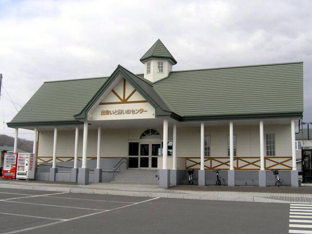 Niikappu Station in Hidaka Main Line, Japan